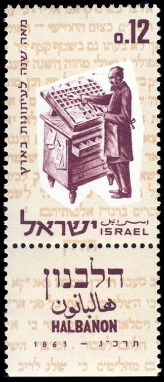 בולי 1963 בישראל: "הלבנון - מאה שנה לעיתונות בארץ"